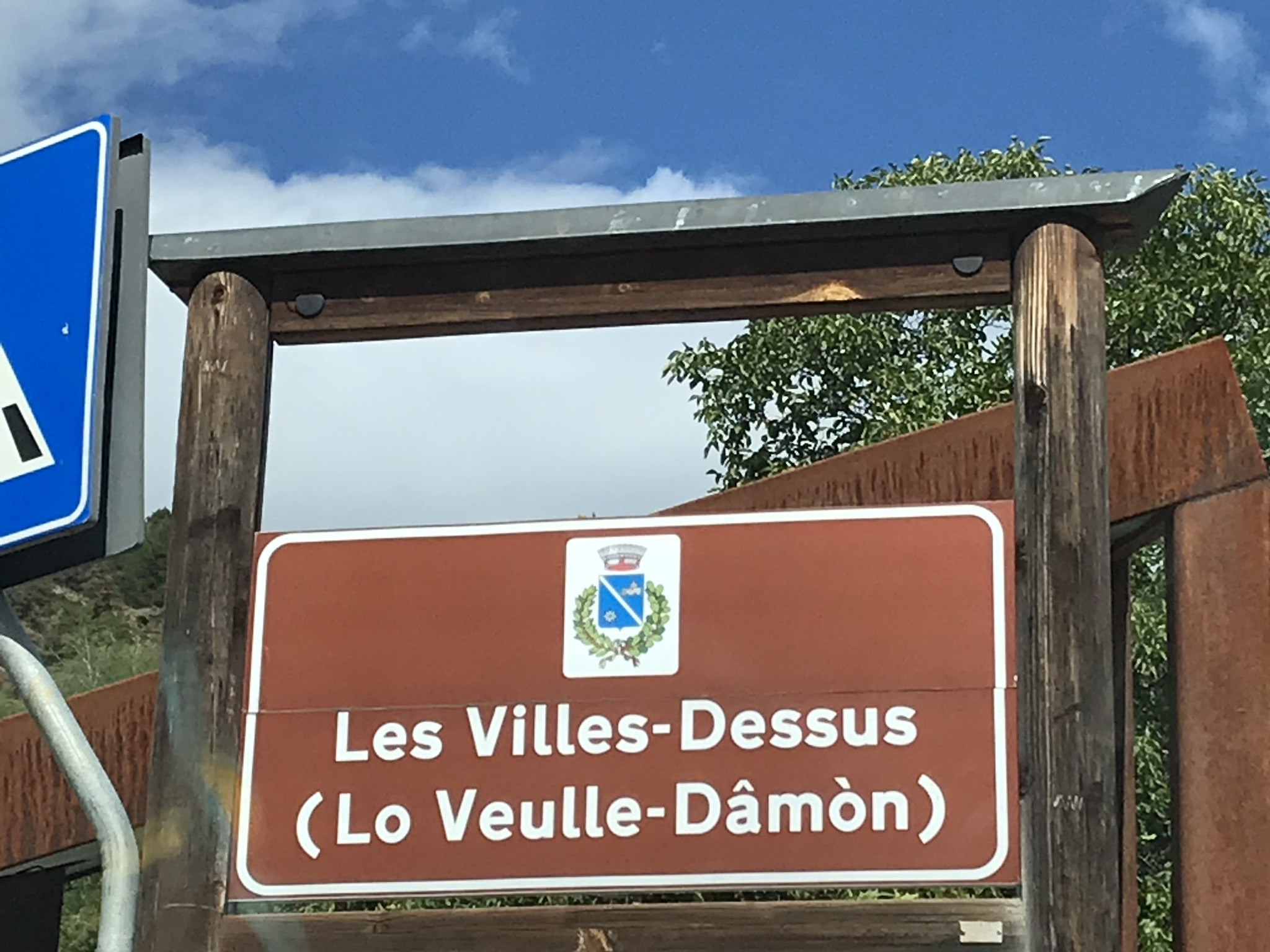 Panneau bilingue en français et arpitan valdôtain à Introd (Vallée d'Aoste)